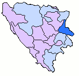 BosniaRegion Zvornik